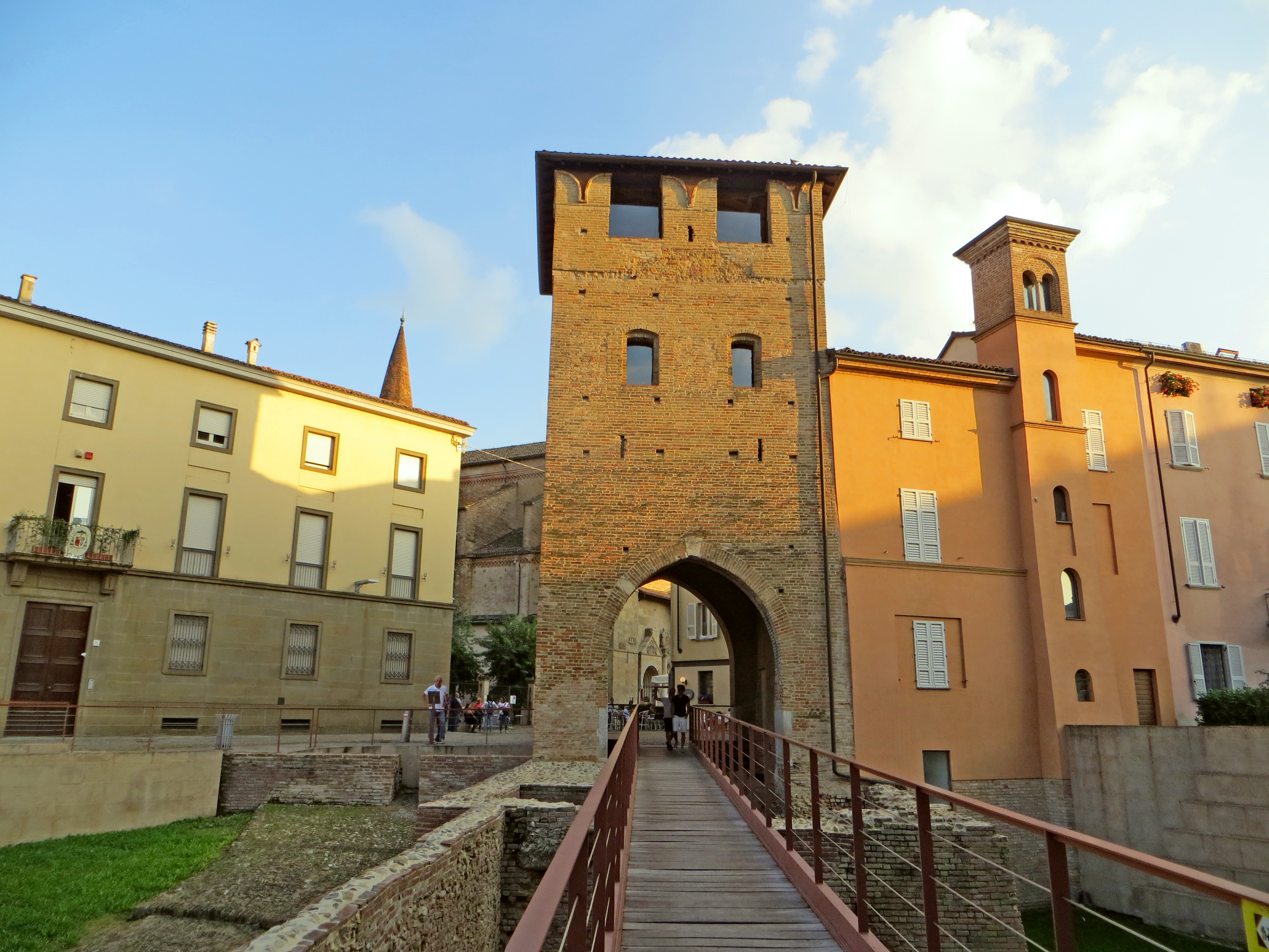 Porta di San Donnino (Fidenza) - lato esterno